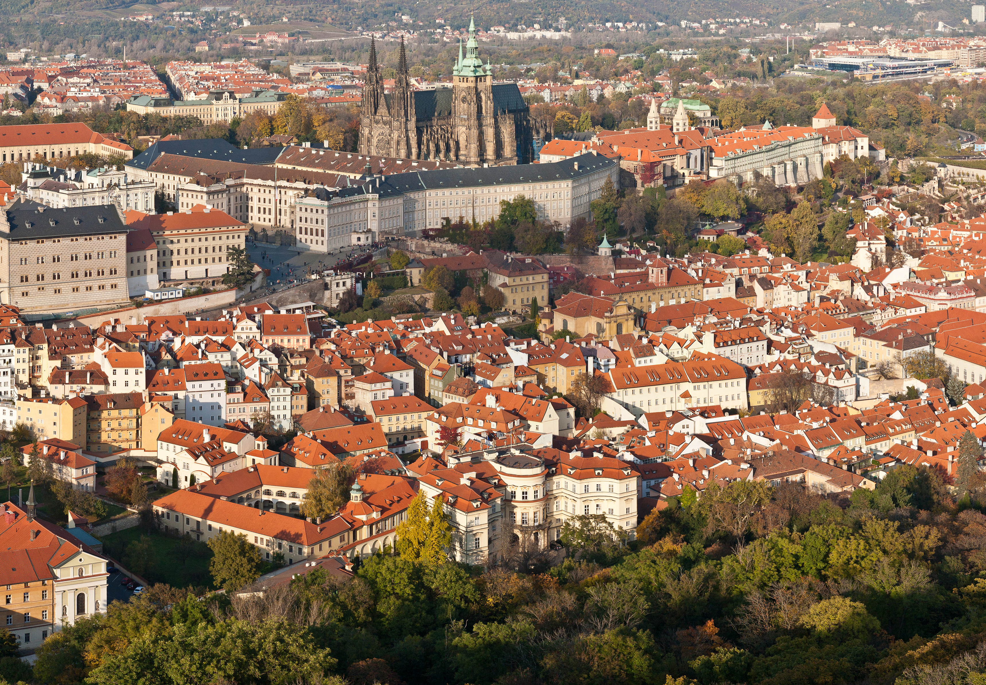 Panorama von Prag mit Blick auf die Burg und die Deutsche Botschaft